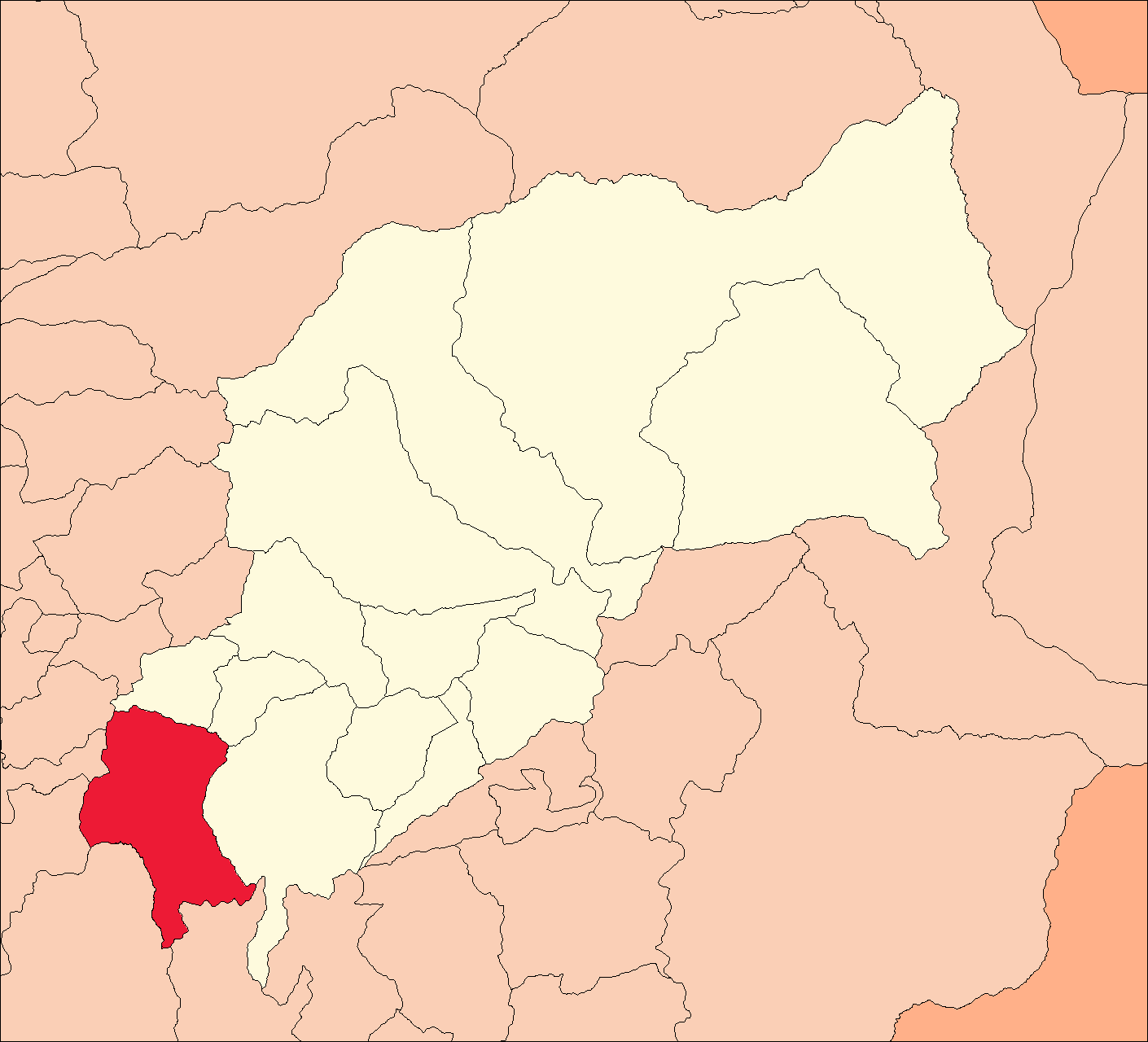 Área del distrito de Margos.